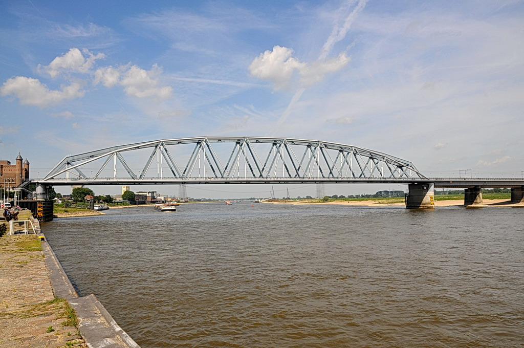 'De Snelbinder' is de naam voor de fietsbrug die in 2004 aan de bestaande spoorbrug over de Waal is vastgemaakt. Officieel is het de naam van het ca. 2 km lange fietspad van de Stieltjesstraat in Nijmegen tot de Griftdijk Noord in Lent. Vlak achter deze trein- annex fietsbrug wordt een nieuwe brug aangelegd die in 2013 klaar moet zijn. Men kan onder de brug door nog net de eerste contouren zien op de oevers. Die brug wordt ‘De Oversteek’ genoemd.